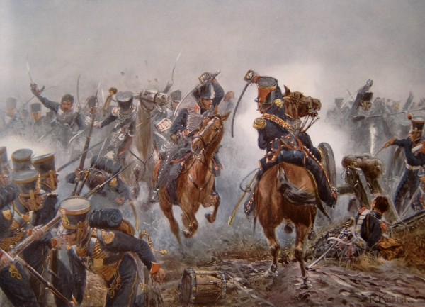 Völkerschlacht bei Leipzig (16. - 19. Oktober 1813). Der verwundete Major von Sohr, den Säbel in der Linken führend, an der Spitze der Brandenburgischen Husaren bei Möckern (16. Okt. 1813).